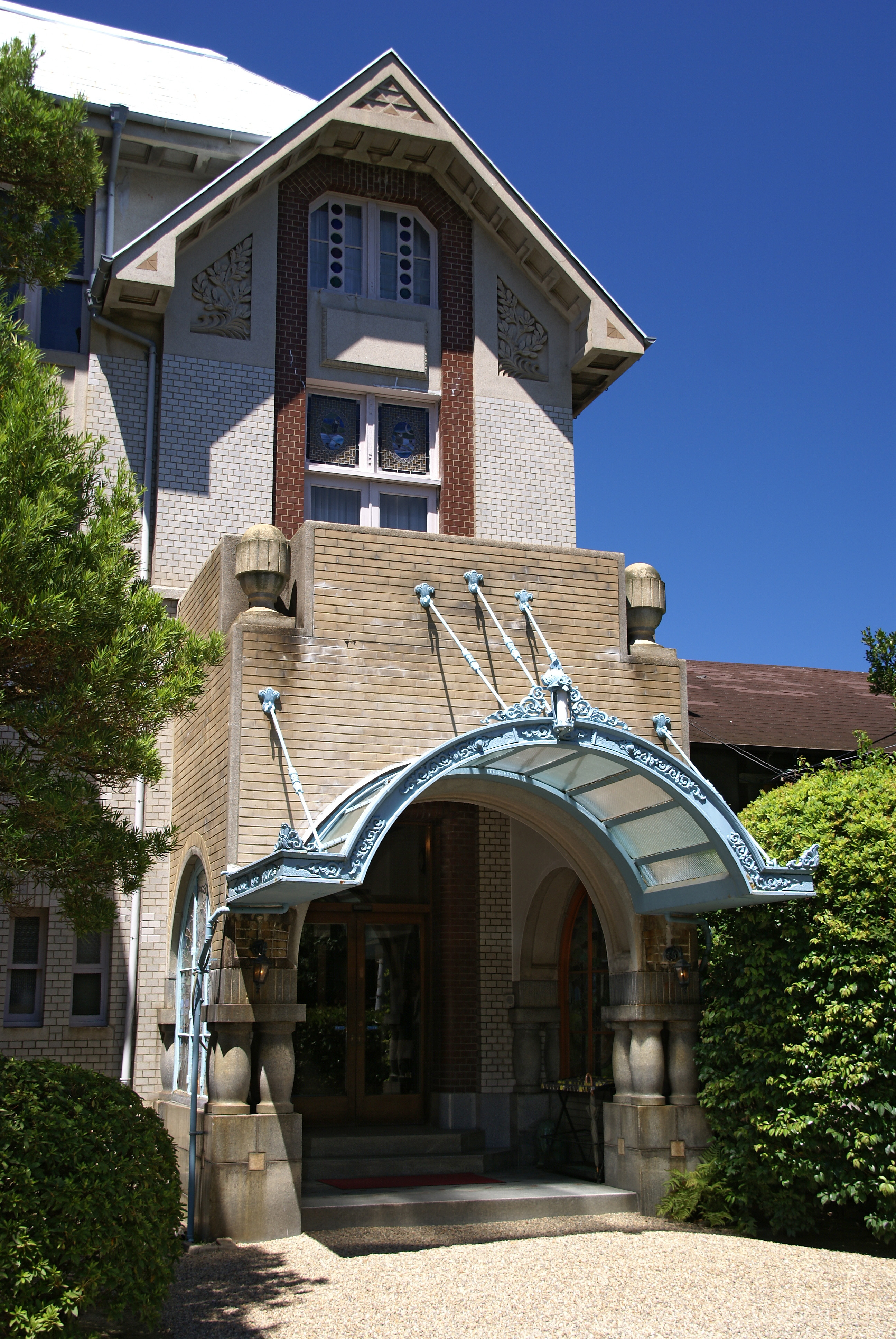 Maiko Hotel in Kobe, Hyogo prefecture, Japan